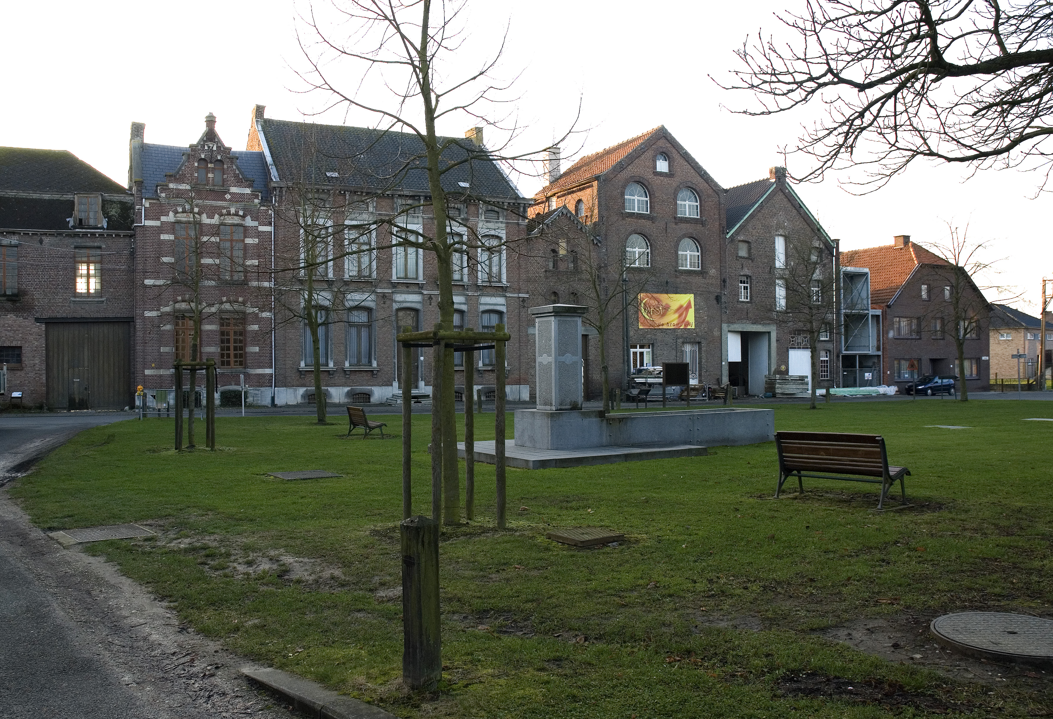 De voormalige brouwerij Hayen in Ulbeek, deelgemeente van Wellen, België